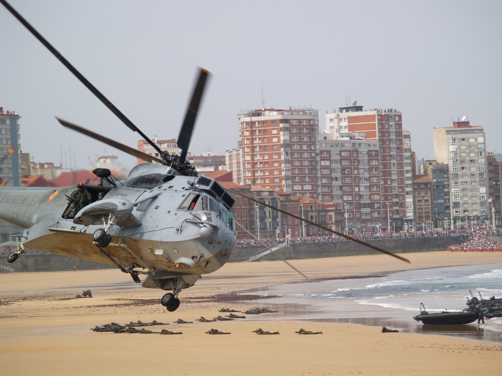 SH 3D evolucionando a baja altura.